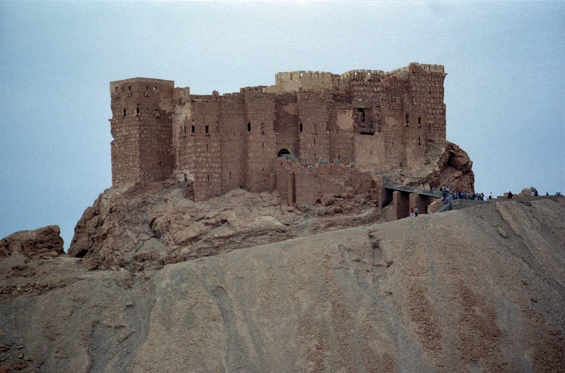 Palmyra, qalat ibn maan